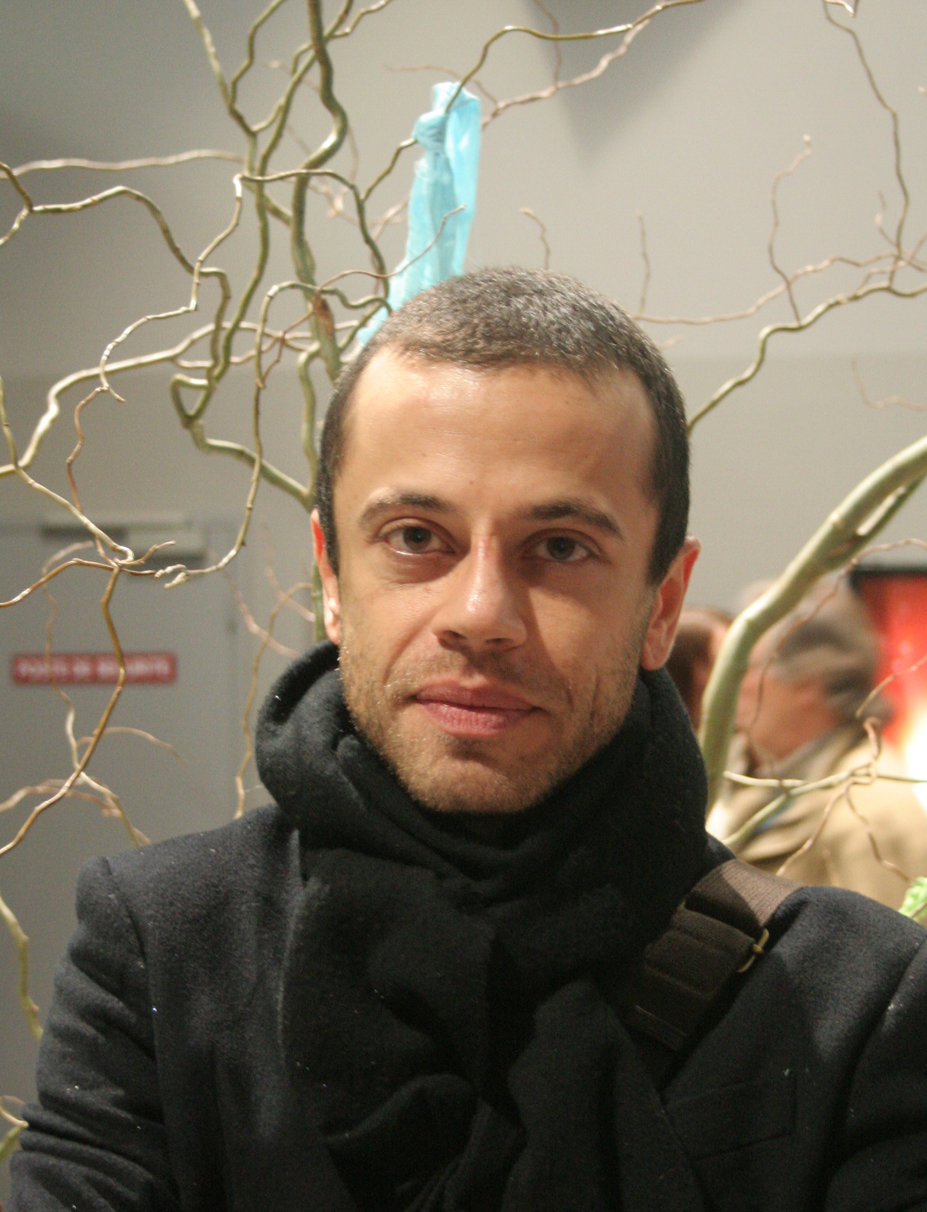 Babak Jalali, Festival international des cinémas d'Asie 2010, Vesoul